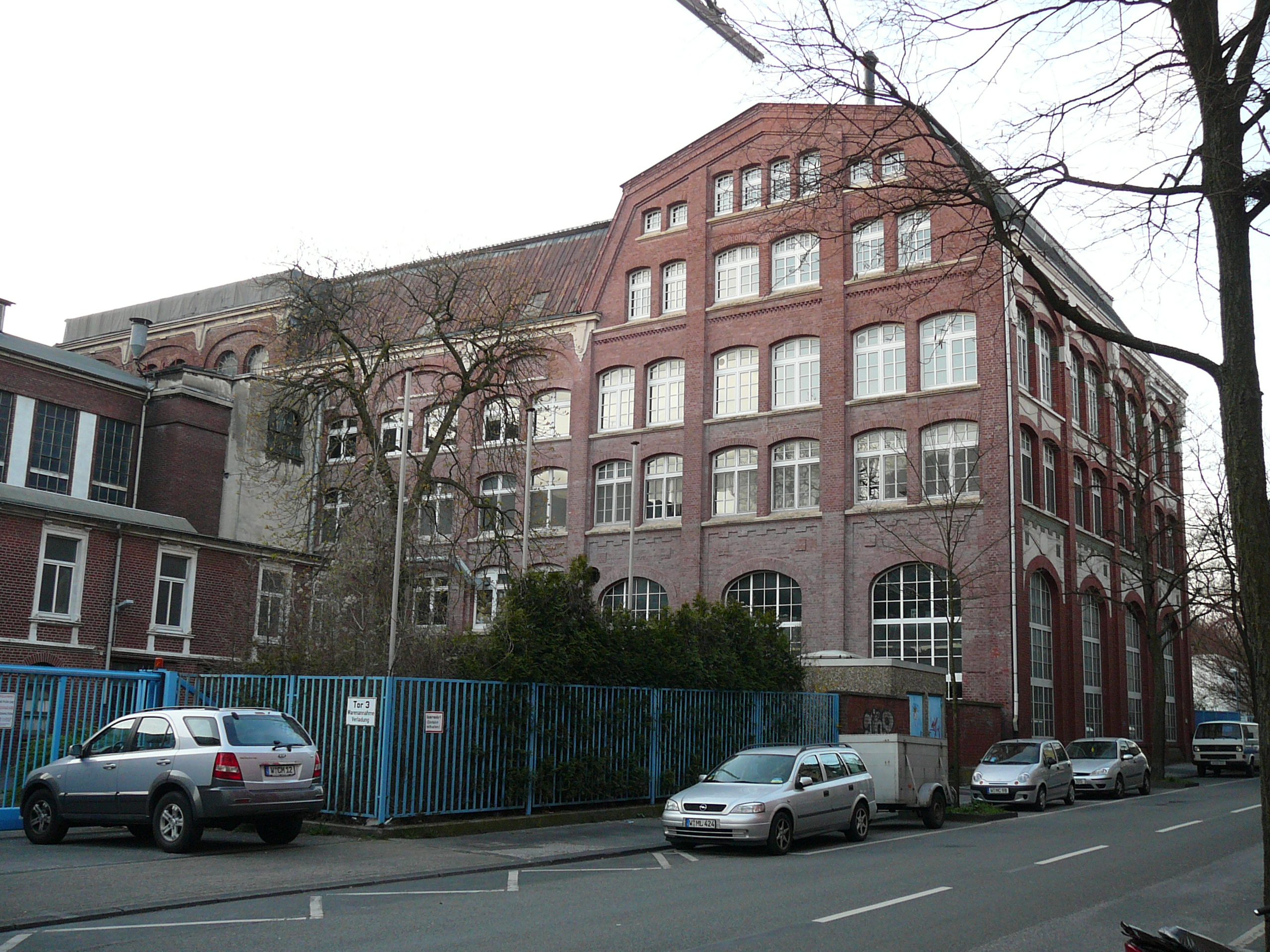 ehemaliges Fabrikgebäude der Seifenfabrik Luhns am Schwarzbach in Wuppertal-Oberbarmen